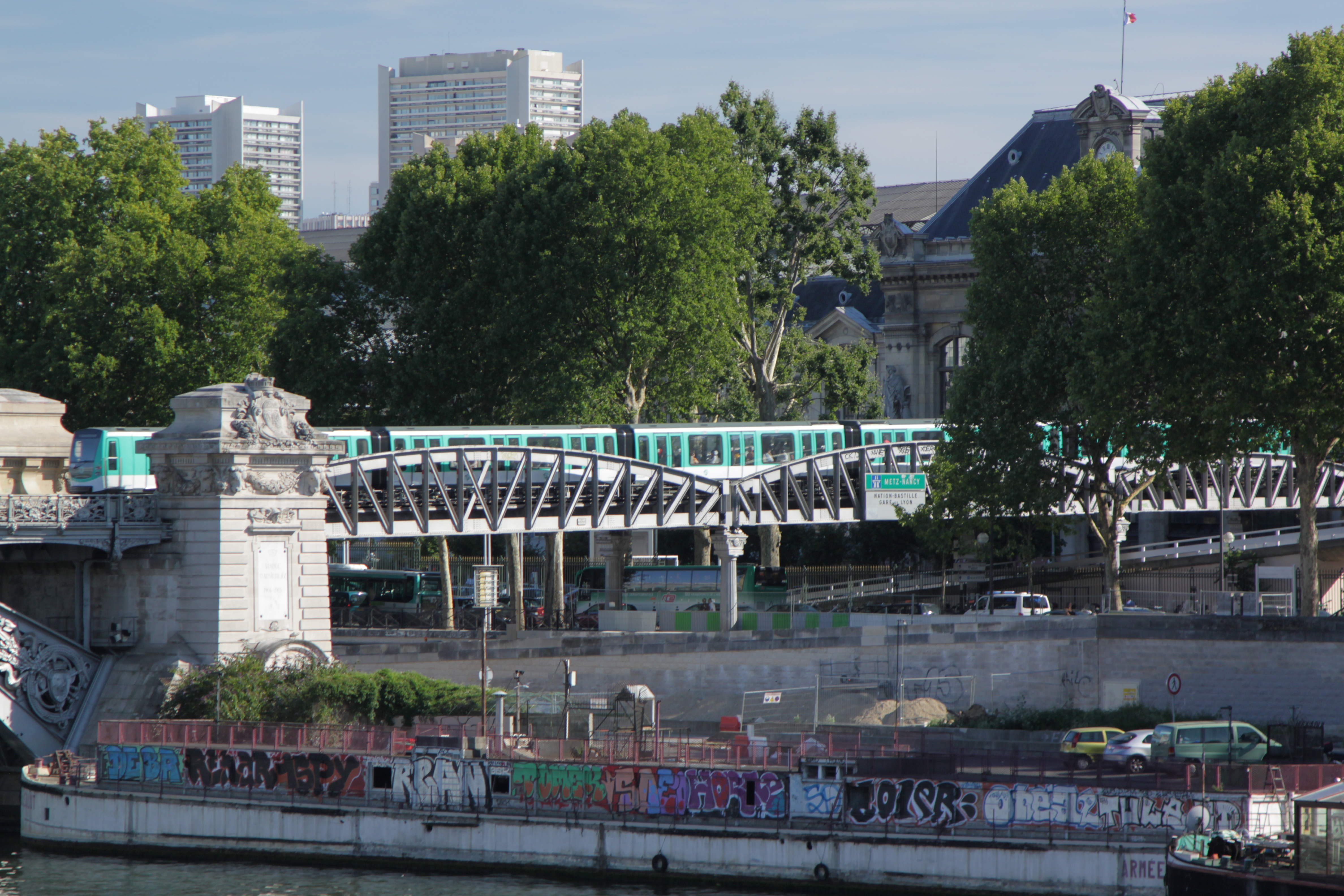 Le MF 01 numéroté 054 sur le pont d'Austerlitz sur la ligne 5 du métro de Paris.